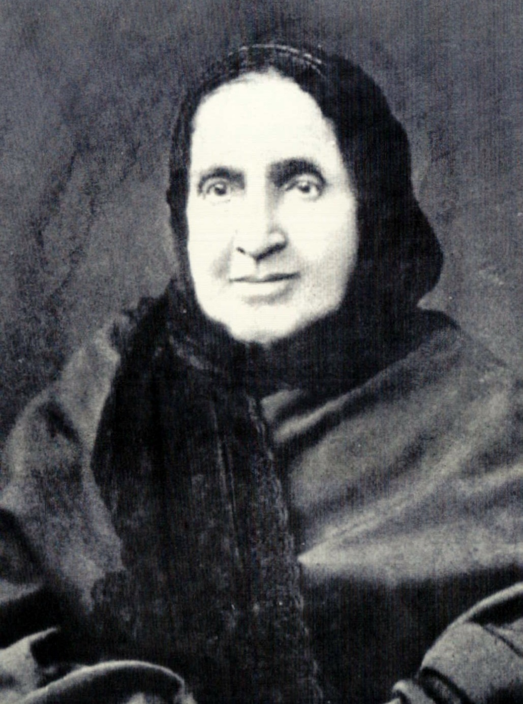 Fotografia circa 1882.de anciana de micaela campos gaviño ,dono terrenos donde se fundara la ciudad de Ovalle.